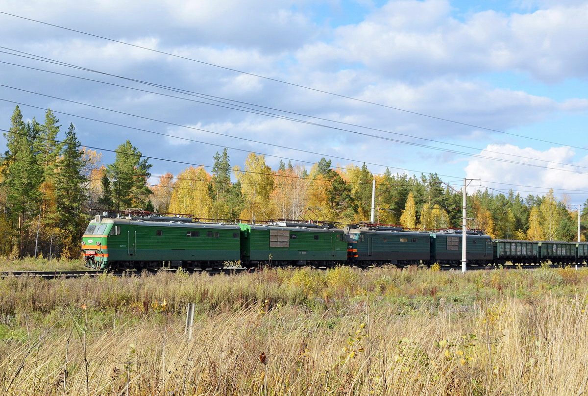 С завода поступил в депо Курган (09.1972 г.) 02.2014 г. передан в депо Златоуст КР-1 Новосибирский ЭРЗ 11.1976 г. КР-1 Челябинский ЭРЗ 08.1981 г. КР-2 Челябинский ЭРЗ 08.1986 г. КР-1 Челябинский ЭРЗ 04.1991 г. КР-1 Челябинский ЭРЗ 12.1996 г. КР-1 ТЧ-3 Курган 11.2001 г. СР ТЧР Зауралье (Курган) 11.2010 г. 03.2006 — прошёл КРП на Челябинском ЭРЗ.